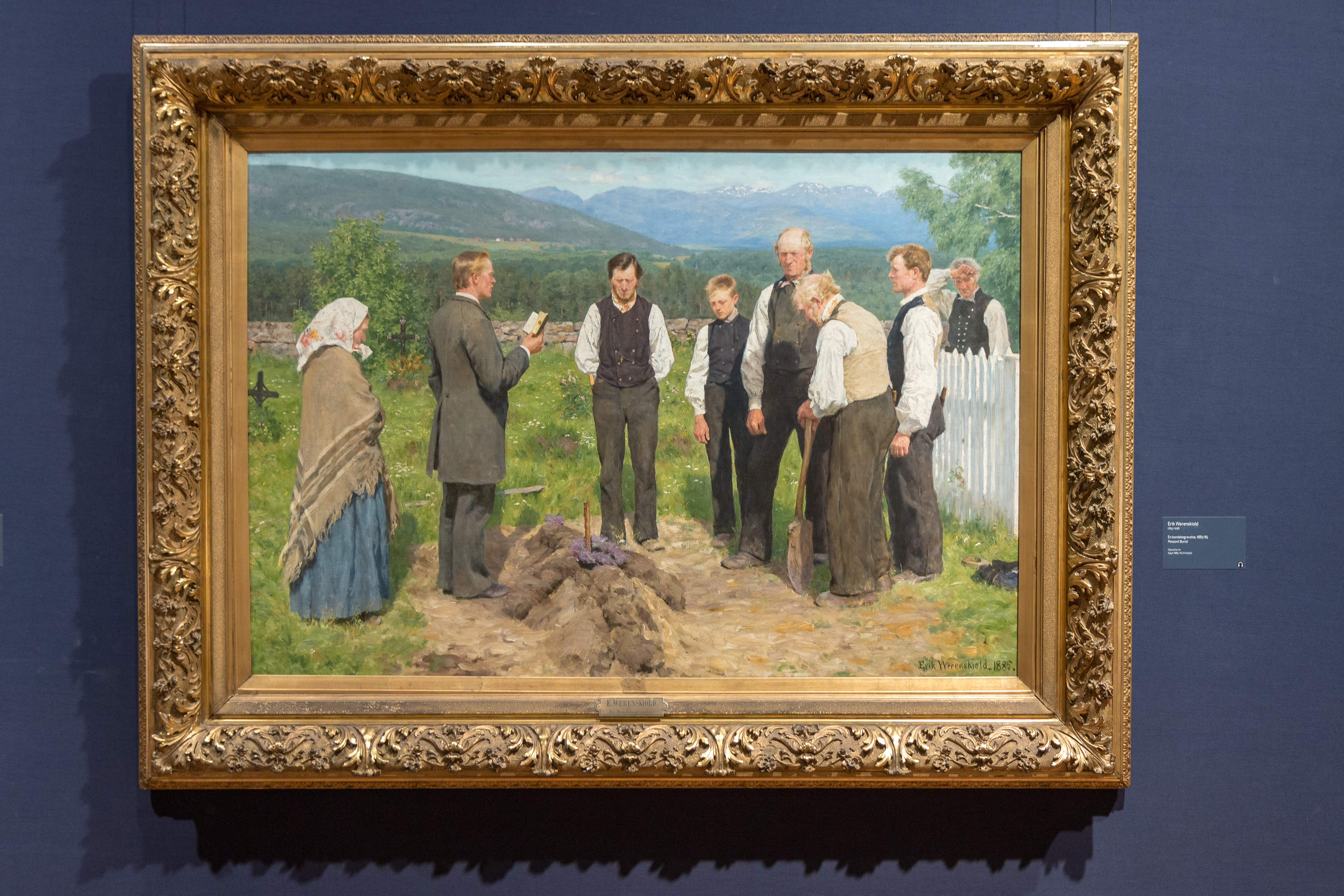 National Museum Oslo. See profile for use.